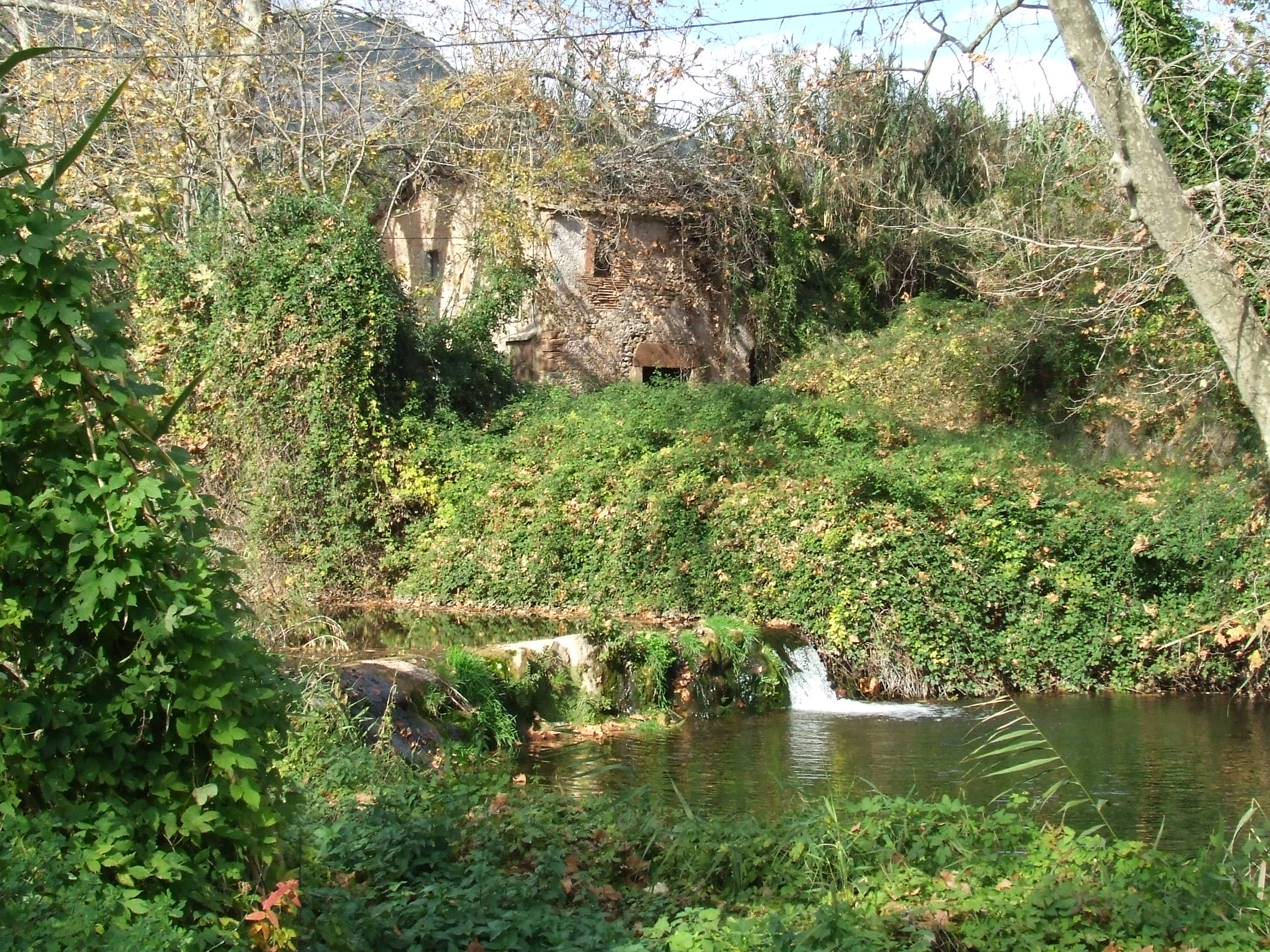 Molí de Regassol (Riells del Fai, Bigues i Riells, Vallès Oriental)